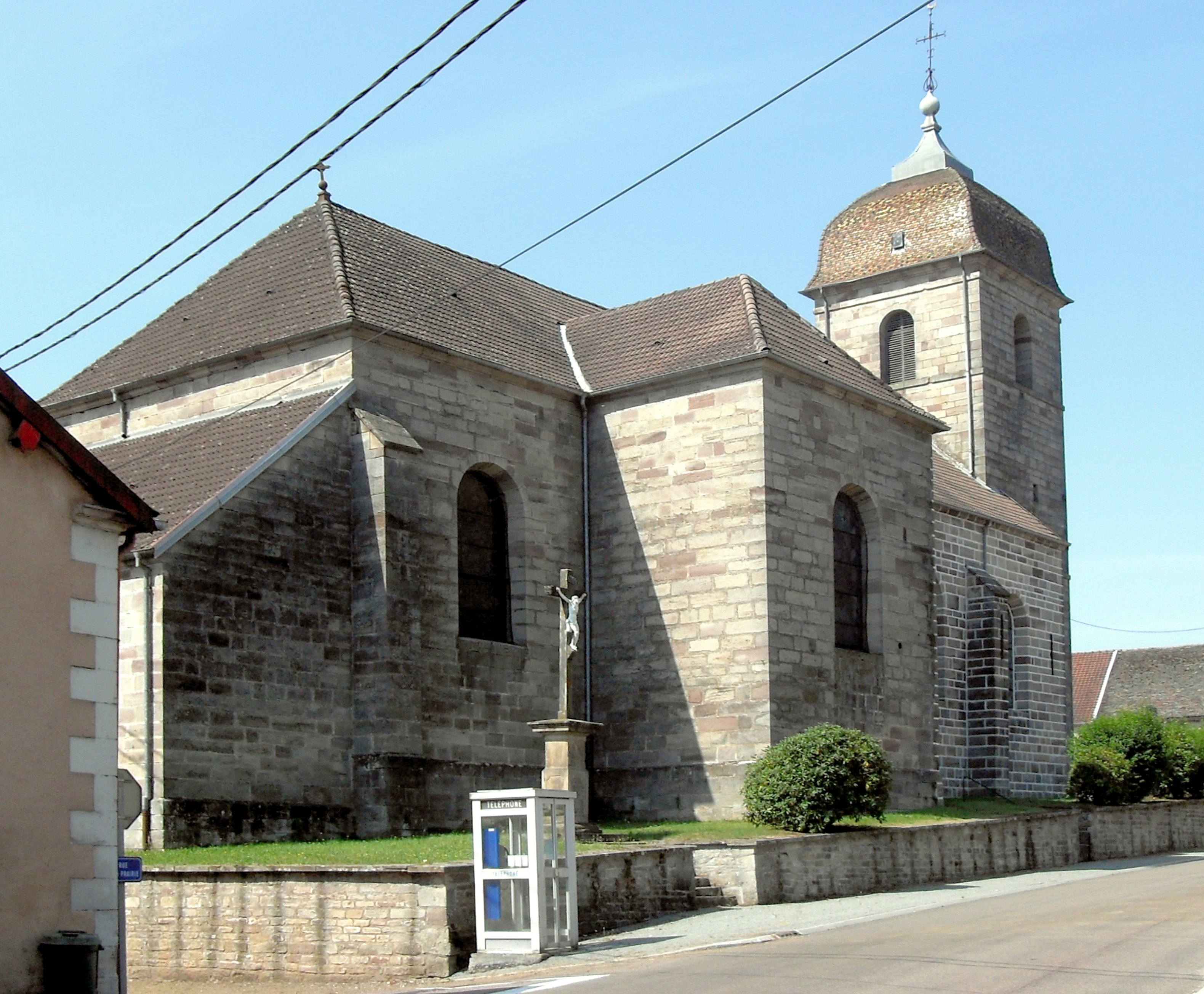 L'église Sainte-Madeleine à Sainte-Marie-en-Chanois, côté nord-est